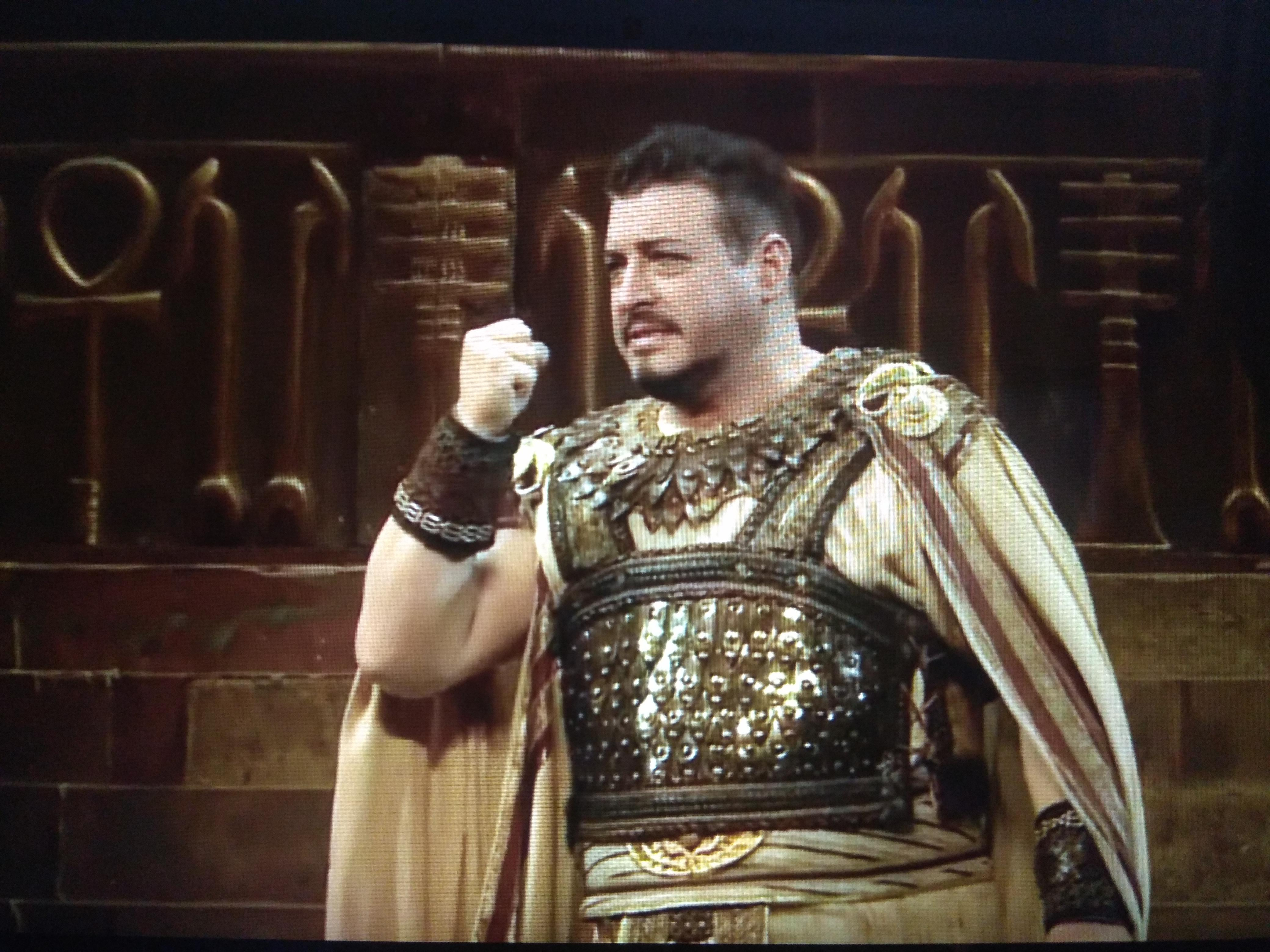 Kamen Tchanev, Opera Astana, Aida, 2016